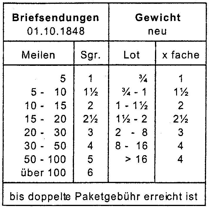 1848 erneute Änderungen in den preußischen Brief-Tarifen